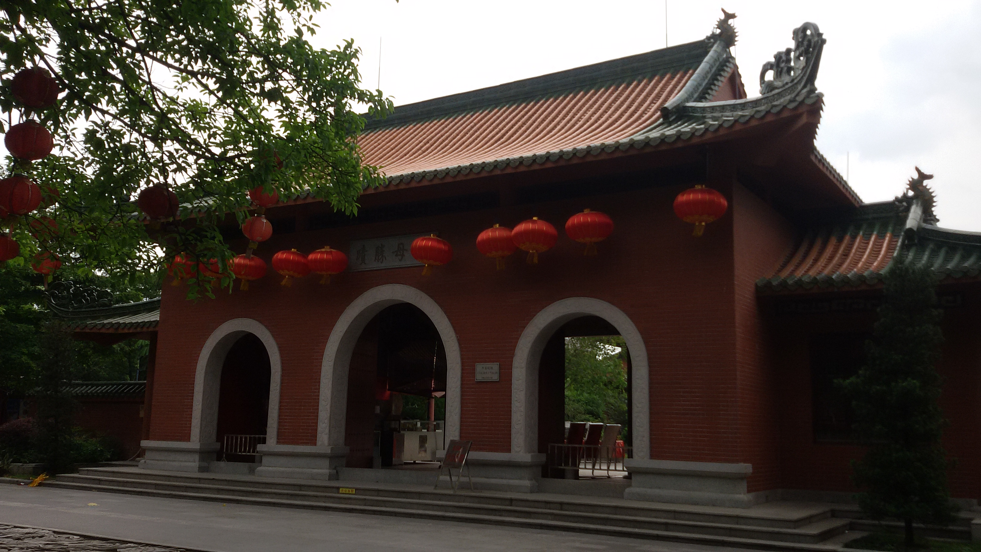 粵語: 黃岐龍母廟